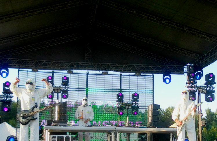 Выступление музыкального коллектива FIRESPACE на фестивале Global Gathering 2012 в Минске